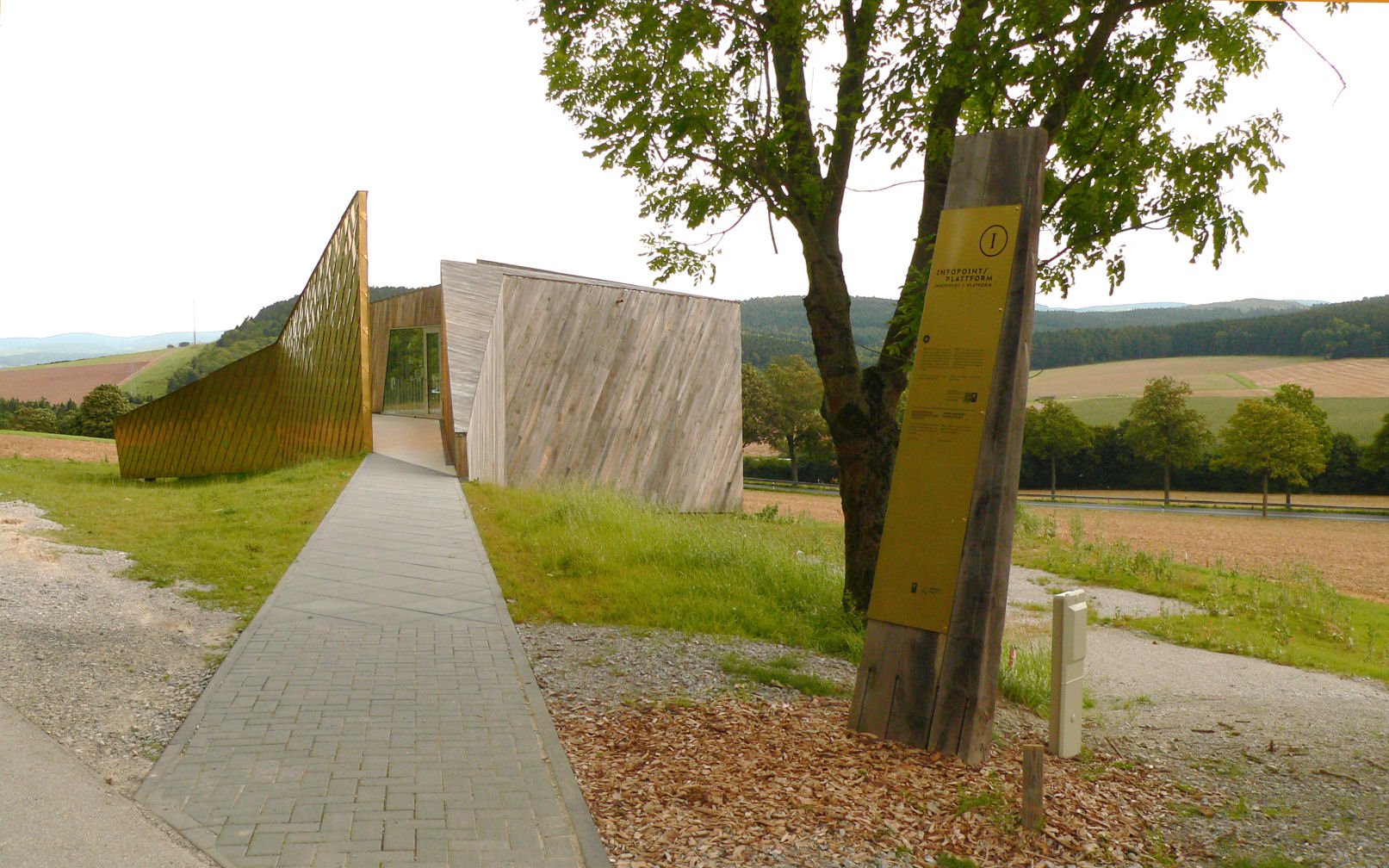 Harzhorn Infopunkt